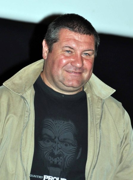 Ludovic Berthillot à l'avant-première du film "Le roi de l'évasion"